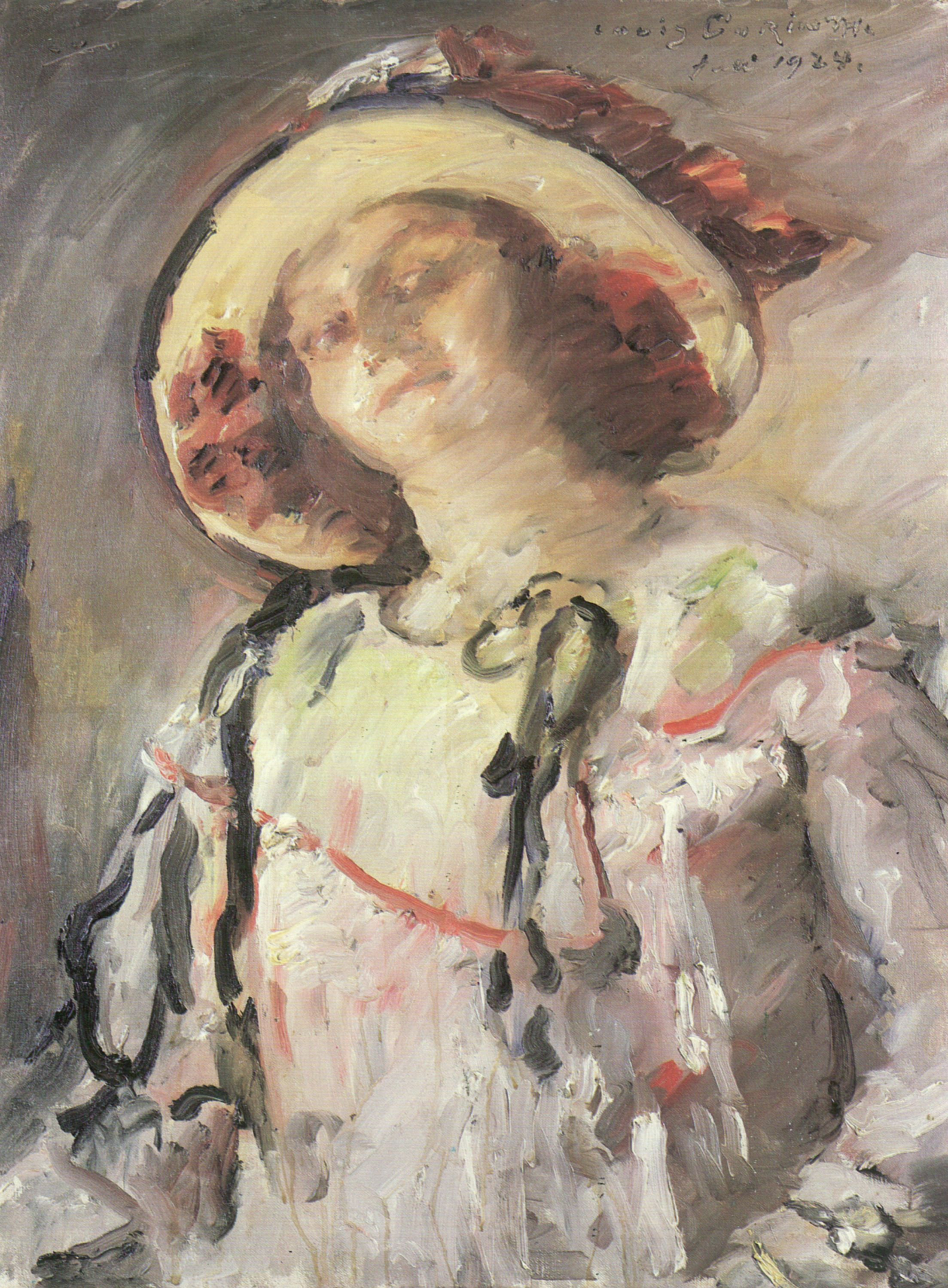 Künstler: Corinth, Lovis Entstehungsjahr: 1924 Maße: 85 × 65 cm Technik: Öl auf Leinwand Aufbewahrungsort: Lübeck Sammlung: Museum für Kunst und Kulturgeschichte Epoche: Impressionismus Land: Deutschland